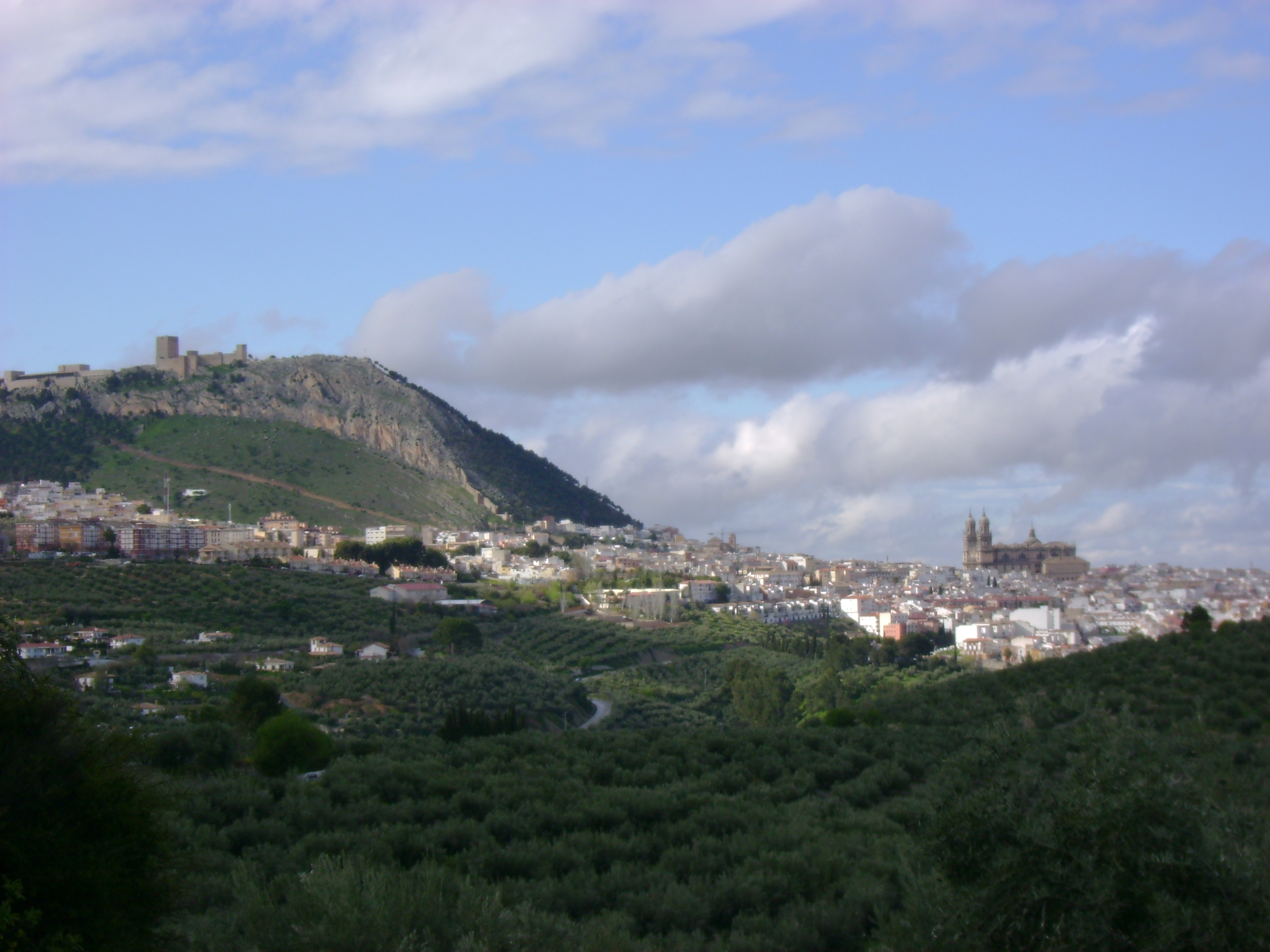 Jaén desde el camino de Pedro Codes.